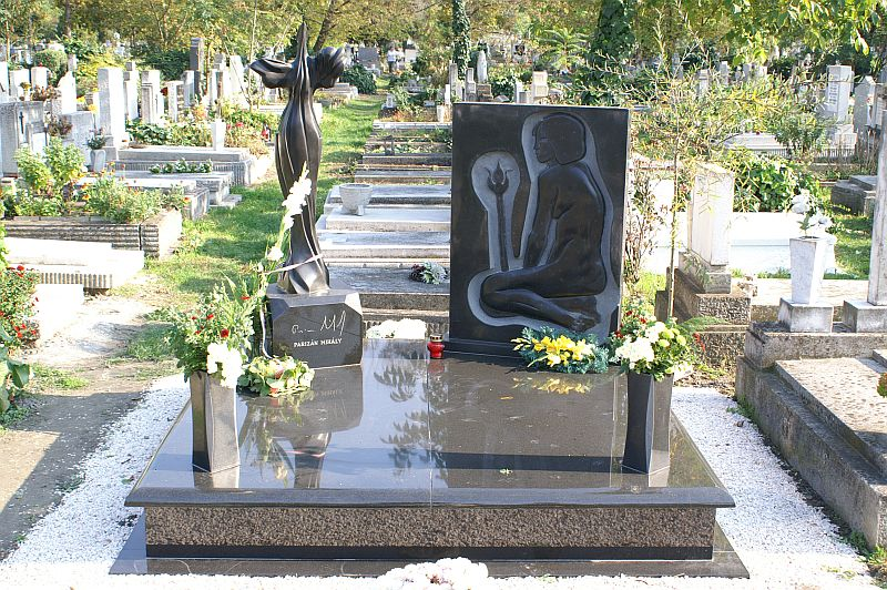 Parizán Mihály (Budapest, 1947. március 29.–Budapest, 2006. június 25.) szobrász sírja Budapesten. Megyeri temető: 8/IV/0/87-88. Ifj. Parizán Mihály és Kamasz Krisztián szobrász alkotása.